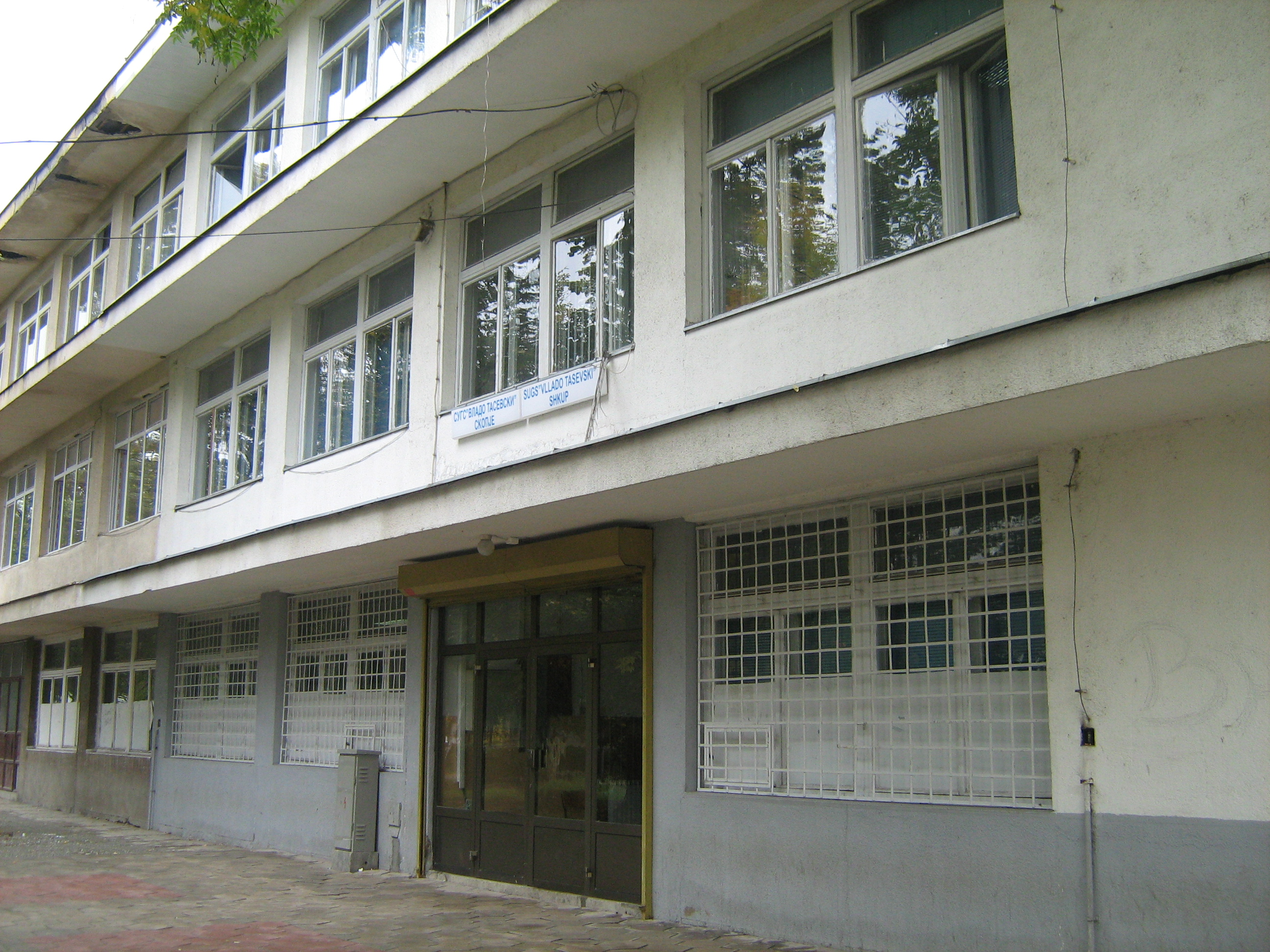 Главниот влез на СУГС Владо Тасевски од Скопје.